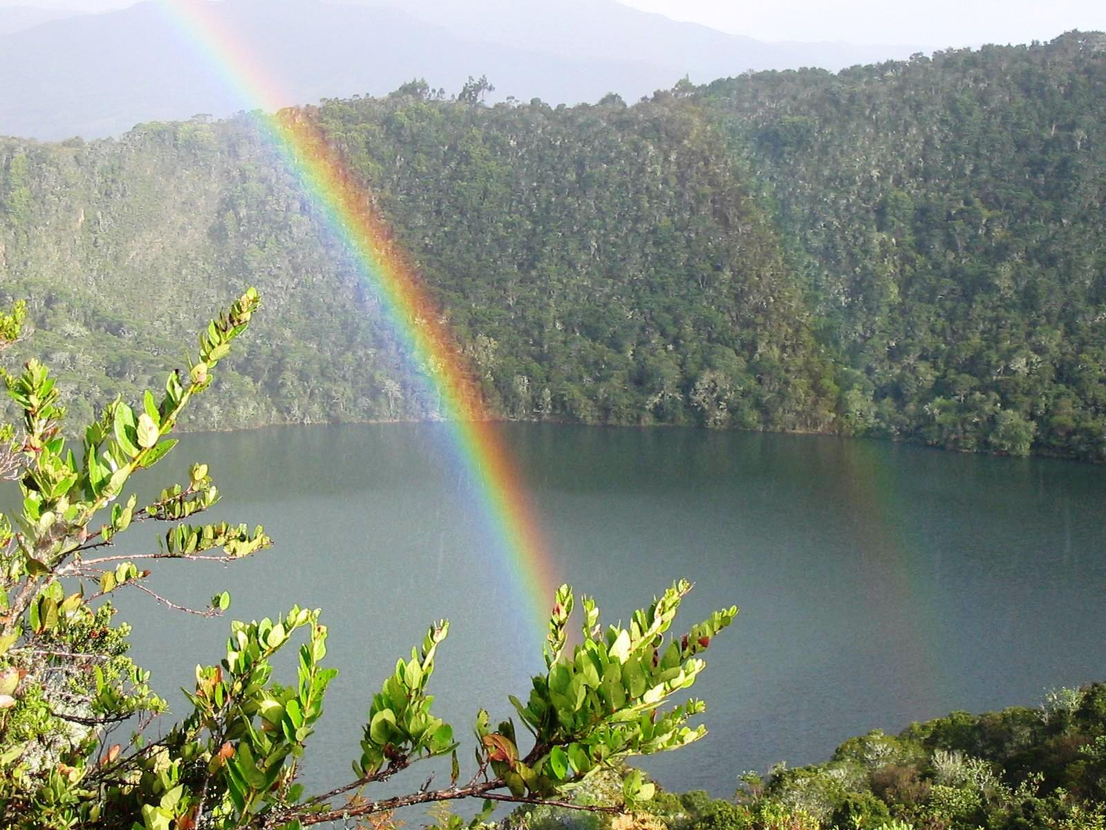 Laguna de la leyenda El Dorado, Guatavita, Colombia